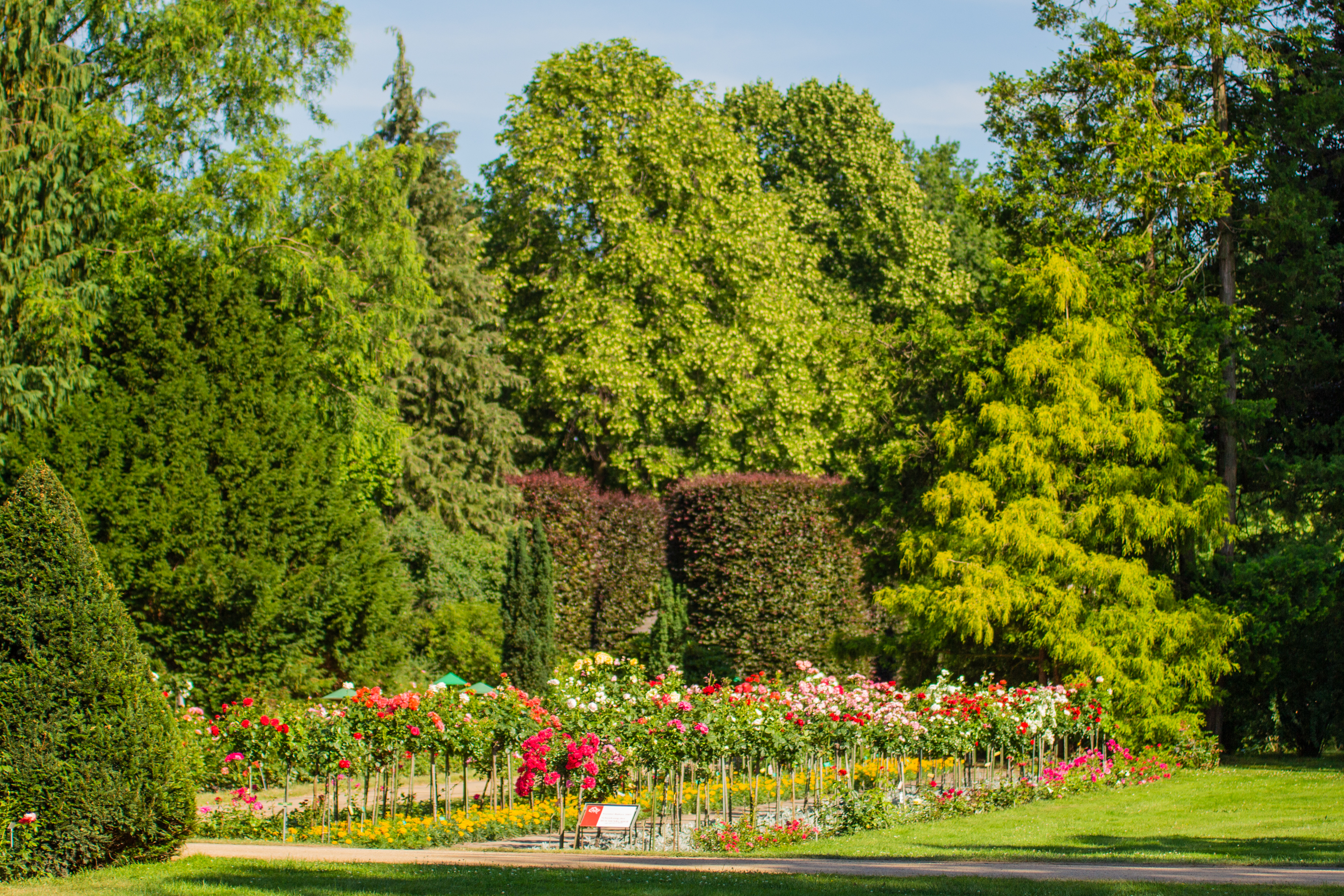 Der Rosenpark